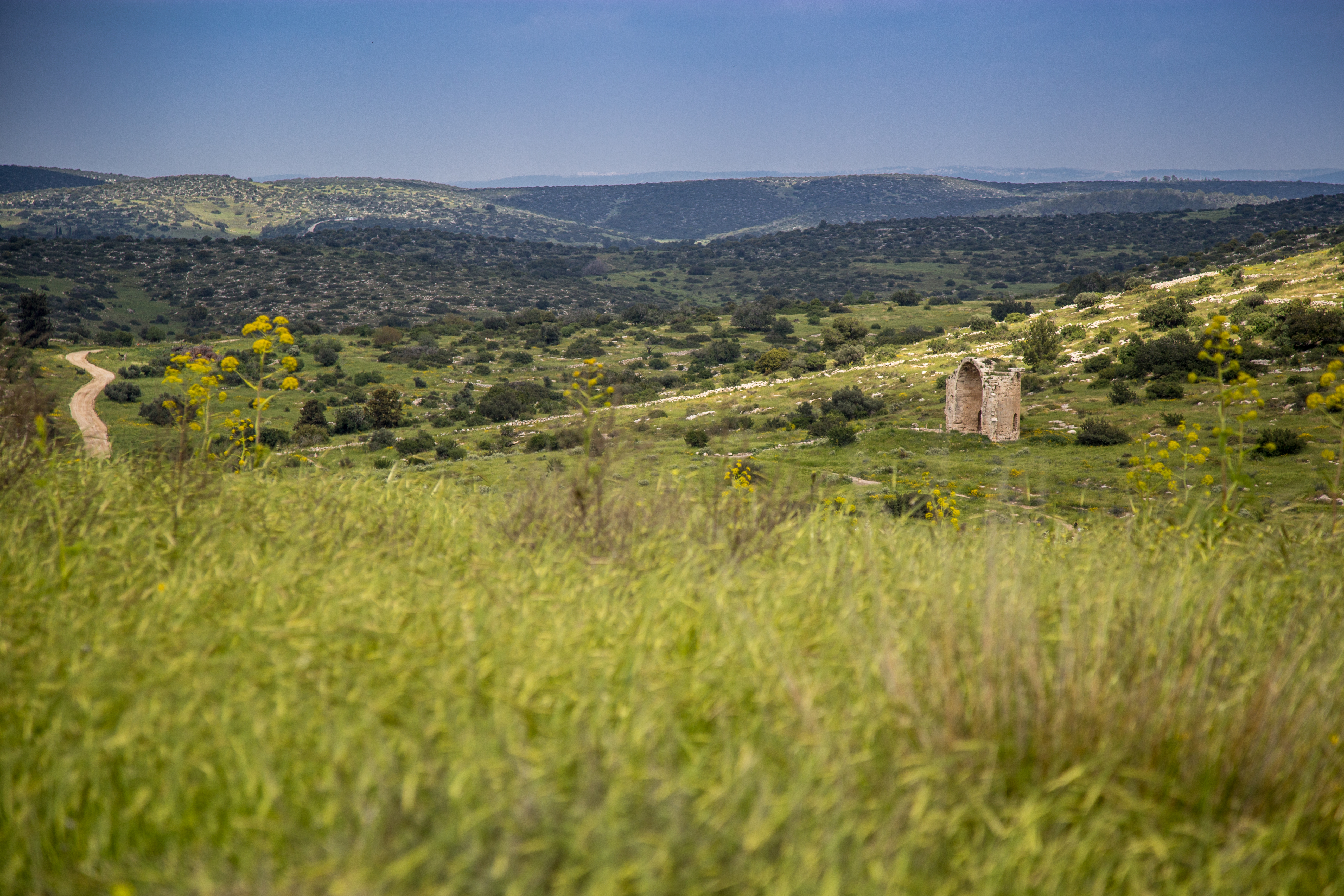 עיר קדומה בשפלת יהודה, בין נחל גוברין לנחל מרשה, סמוך לקיבוץ בית גוברין. נזכרת בכתביו של יוסף בן מתתיהו (יוספוס פלאביוס) כ"בית גברי", ובמקורות חז"ל כ "בית גובריא". משמעו של השם בארמית הוא "בית הגברים", וע"פ המדרש ישבו במערות סביב היישוב ענקים, ומכאן שמה. ביוני 2014 הכריז ארגון אונסק"ו על בית גוברין ומרשה הסמוכה כאתר מורשת עולמית.